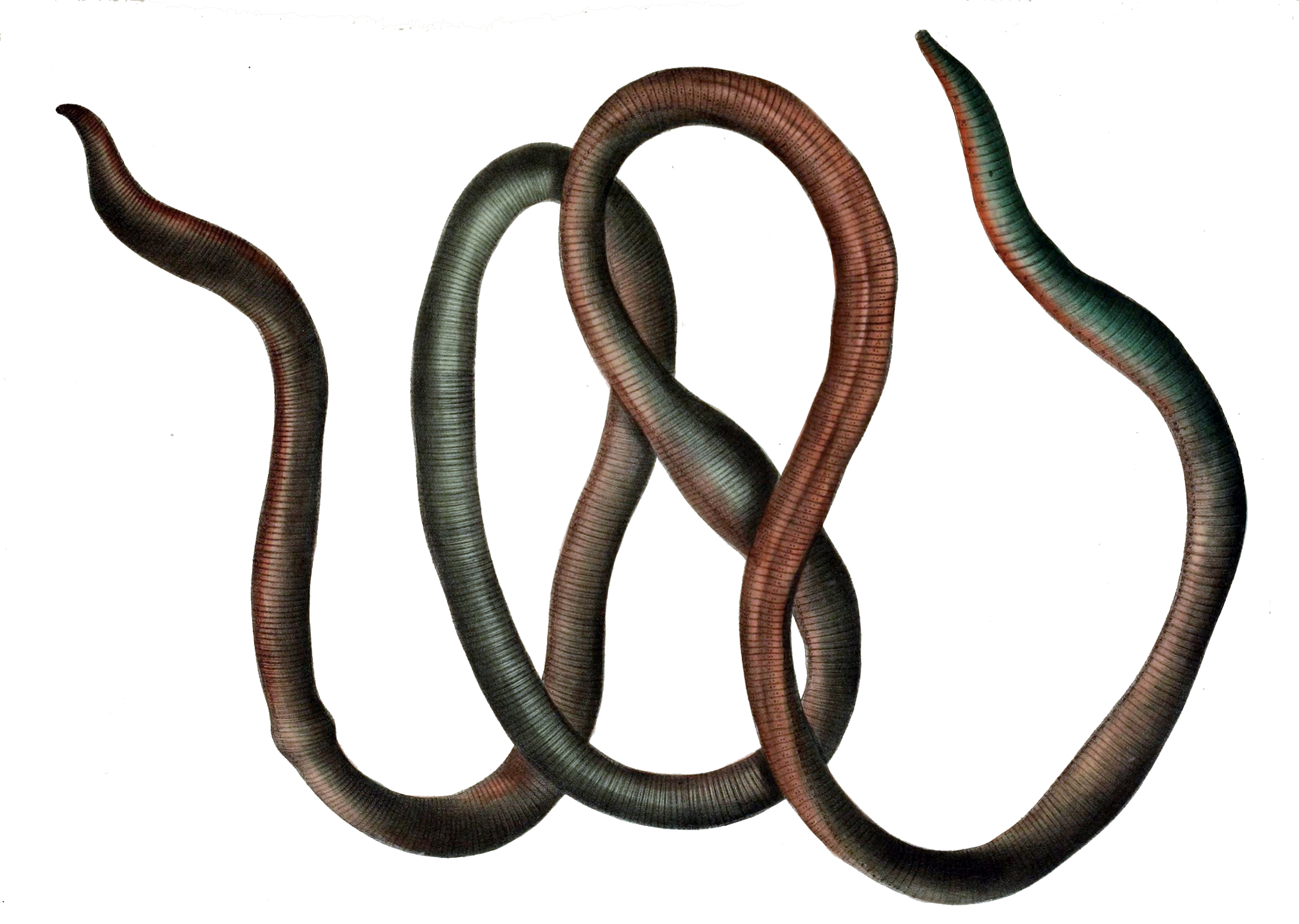 Microchaeta (rappi ?)